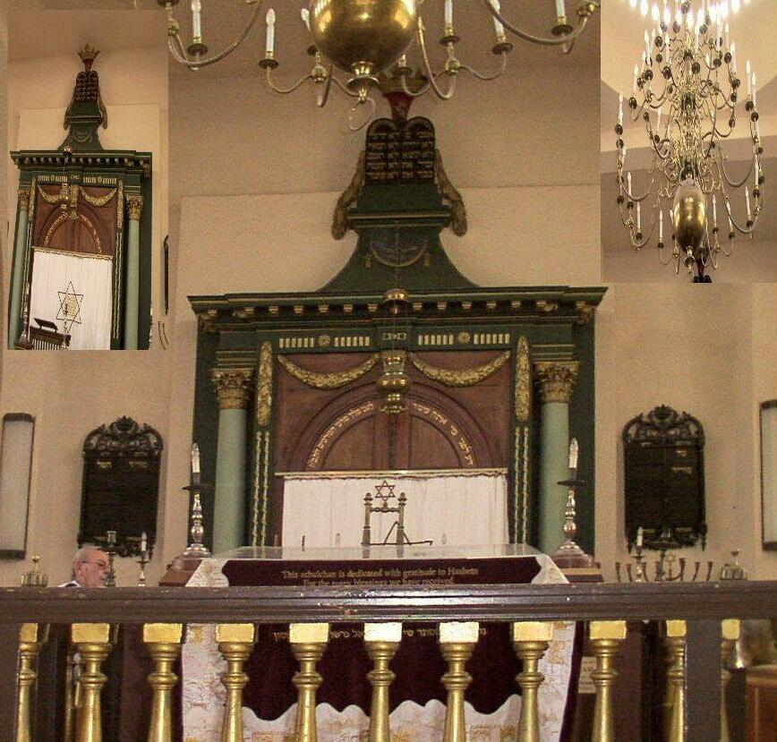 ארון הקודש